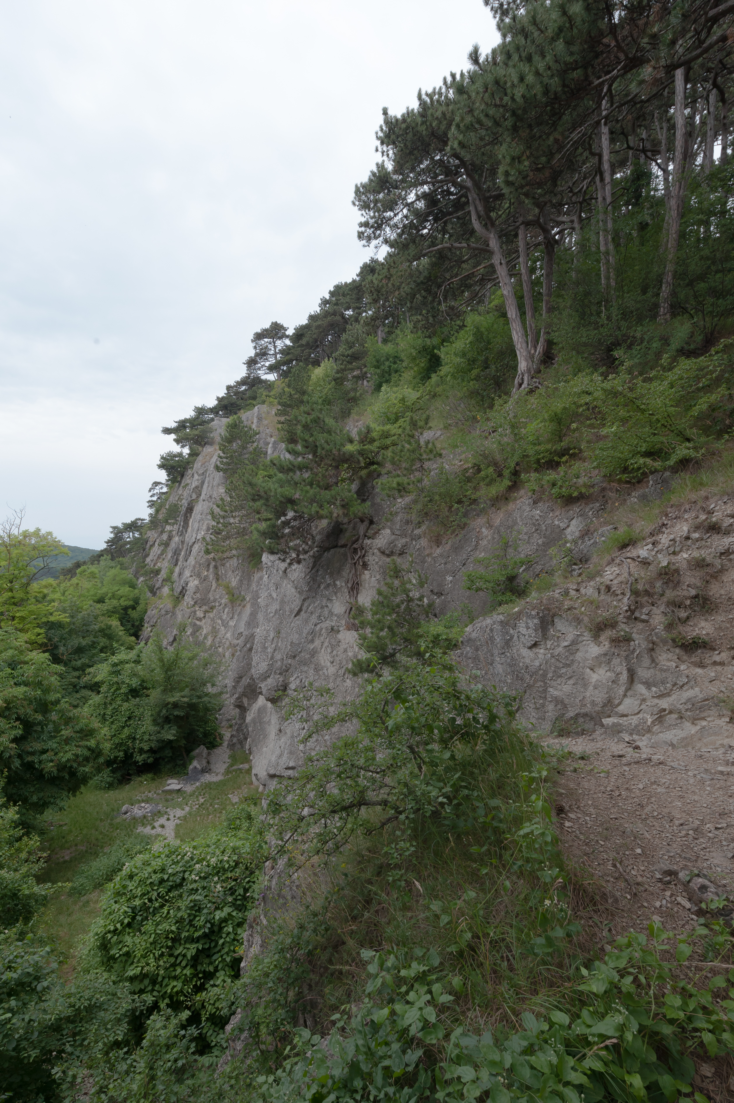 Rodaun, Mizzi-Langer-Wand This media shows the natural monument in Vienna with the ID 716.